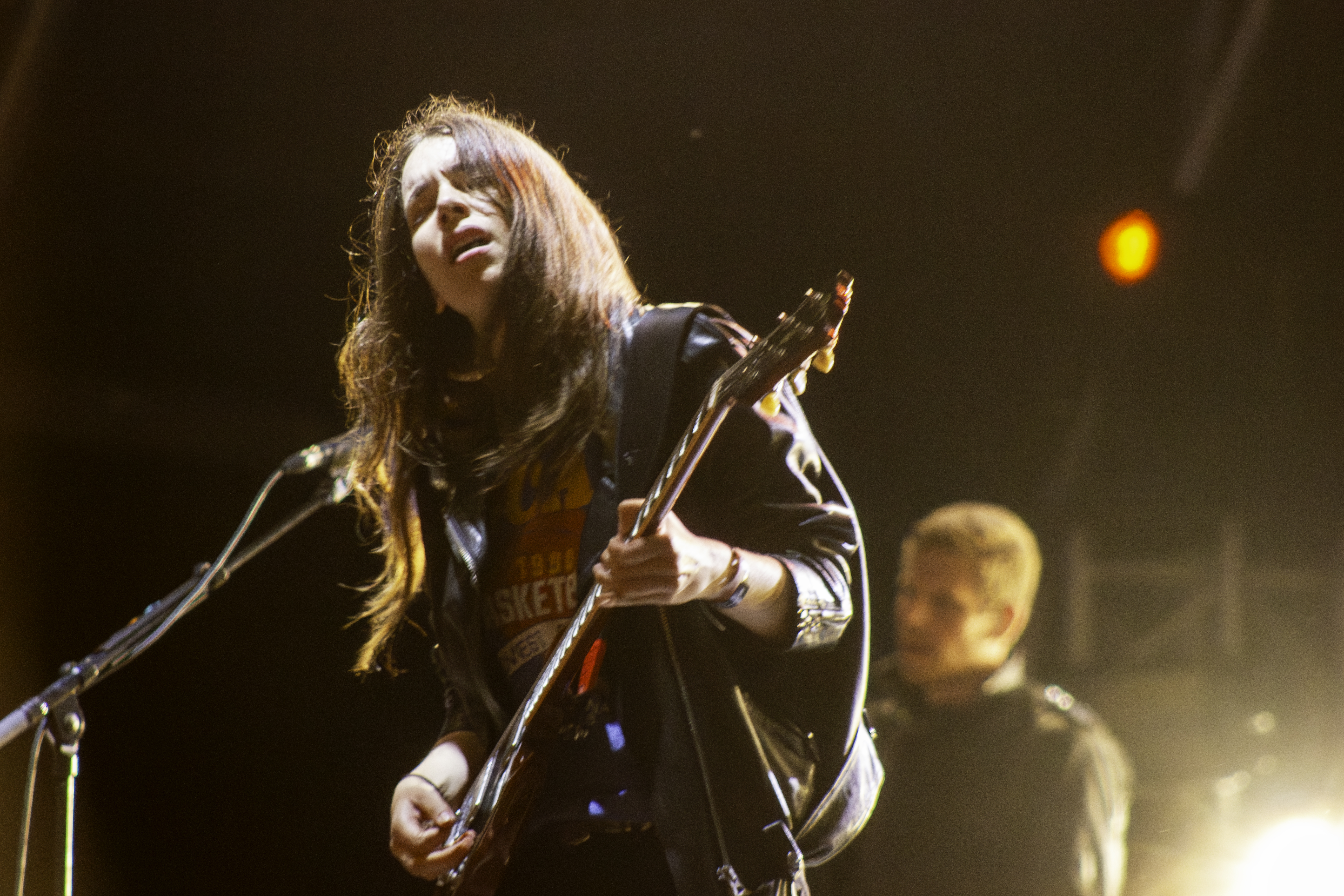 Danielle Haim no NOS Primavera Sound 2014 de Porto